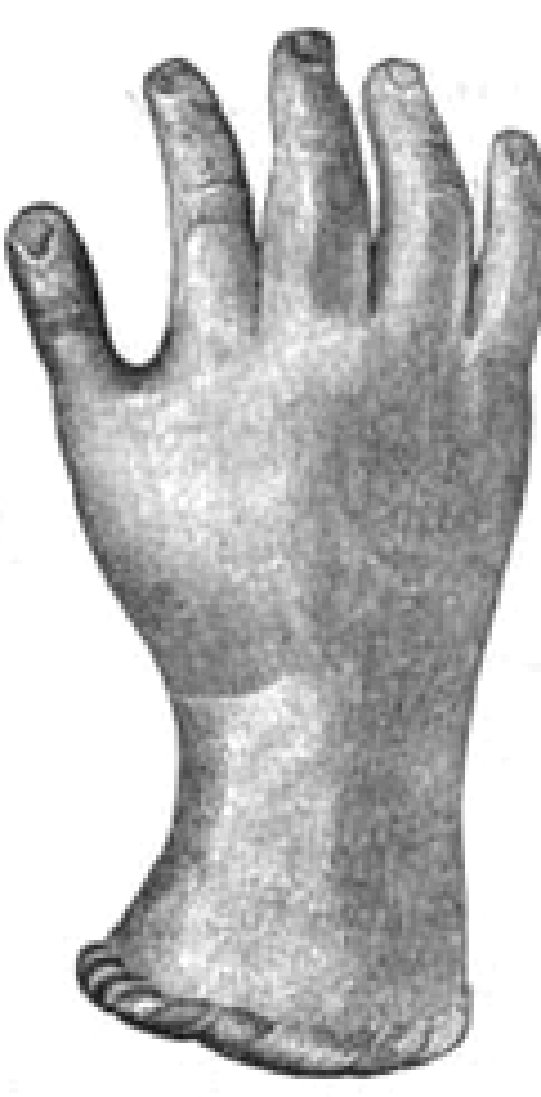 Bronzene Schwurhand aus einem Tempelinventar, gefunden in Halton Chesters (Onnum).